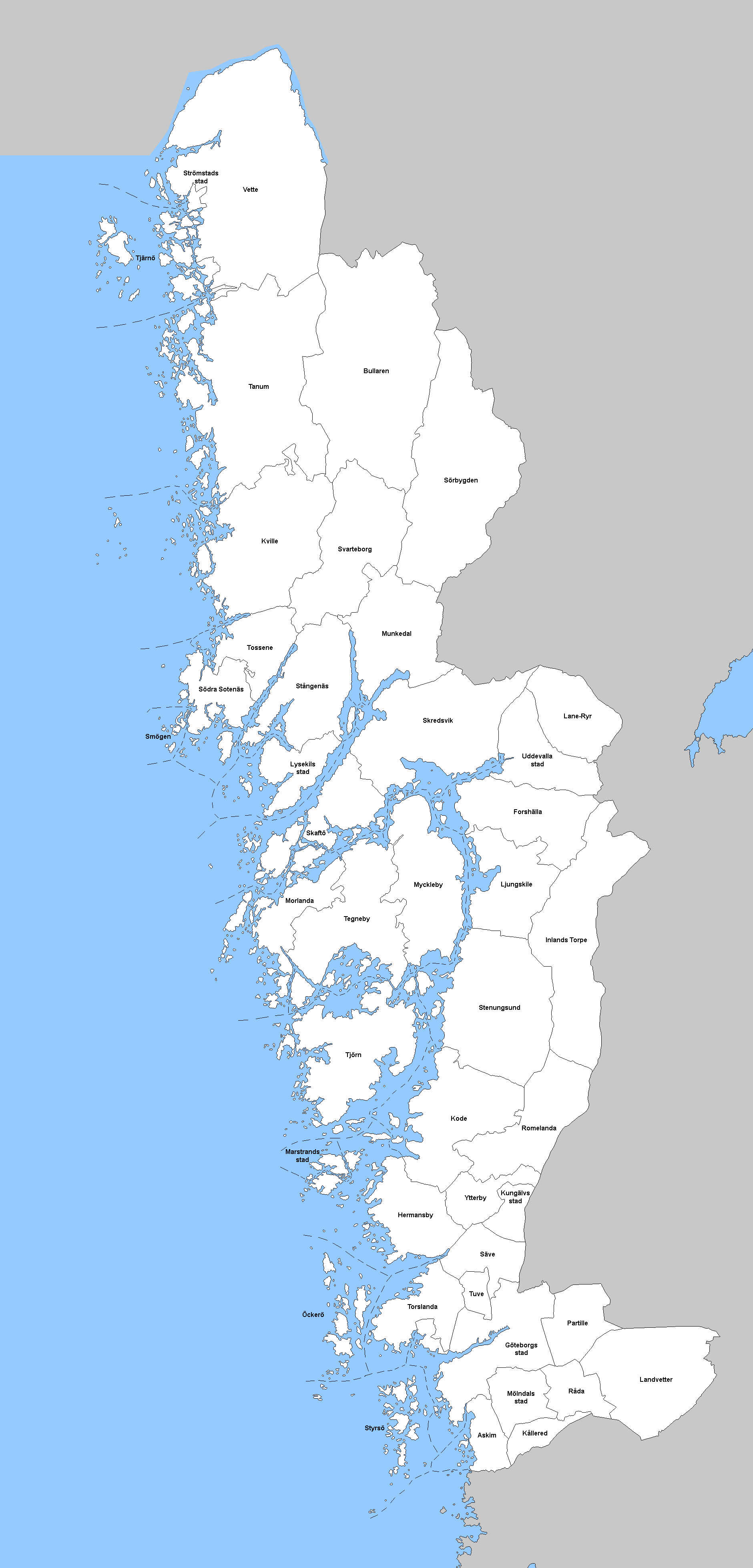 Kommunerna i Göteborgs och Bohus län den 1 januari 1952